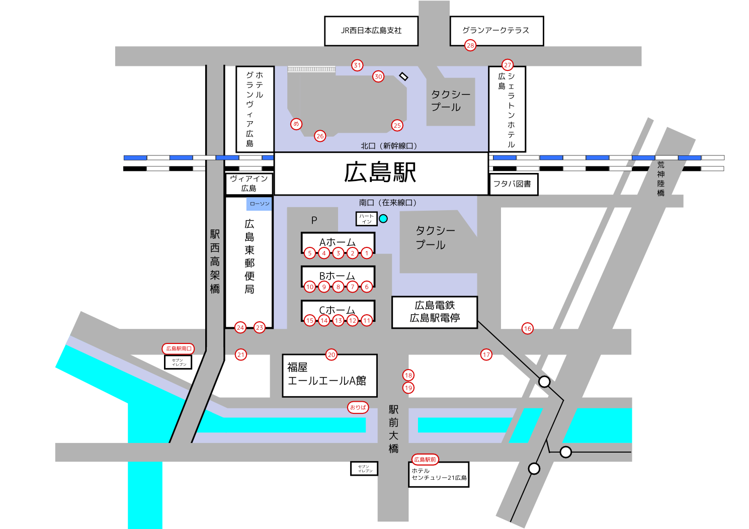 広島駅バス停位置の簡略図。 SVG版も別ファイルにある。ただしWikimediaのプレビューが不良→「」